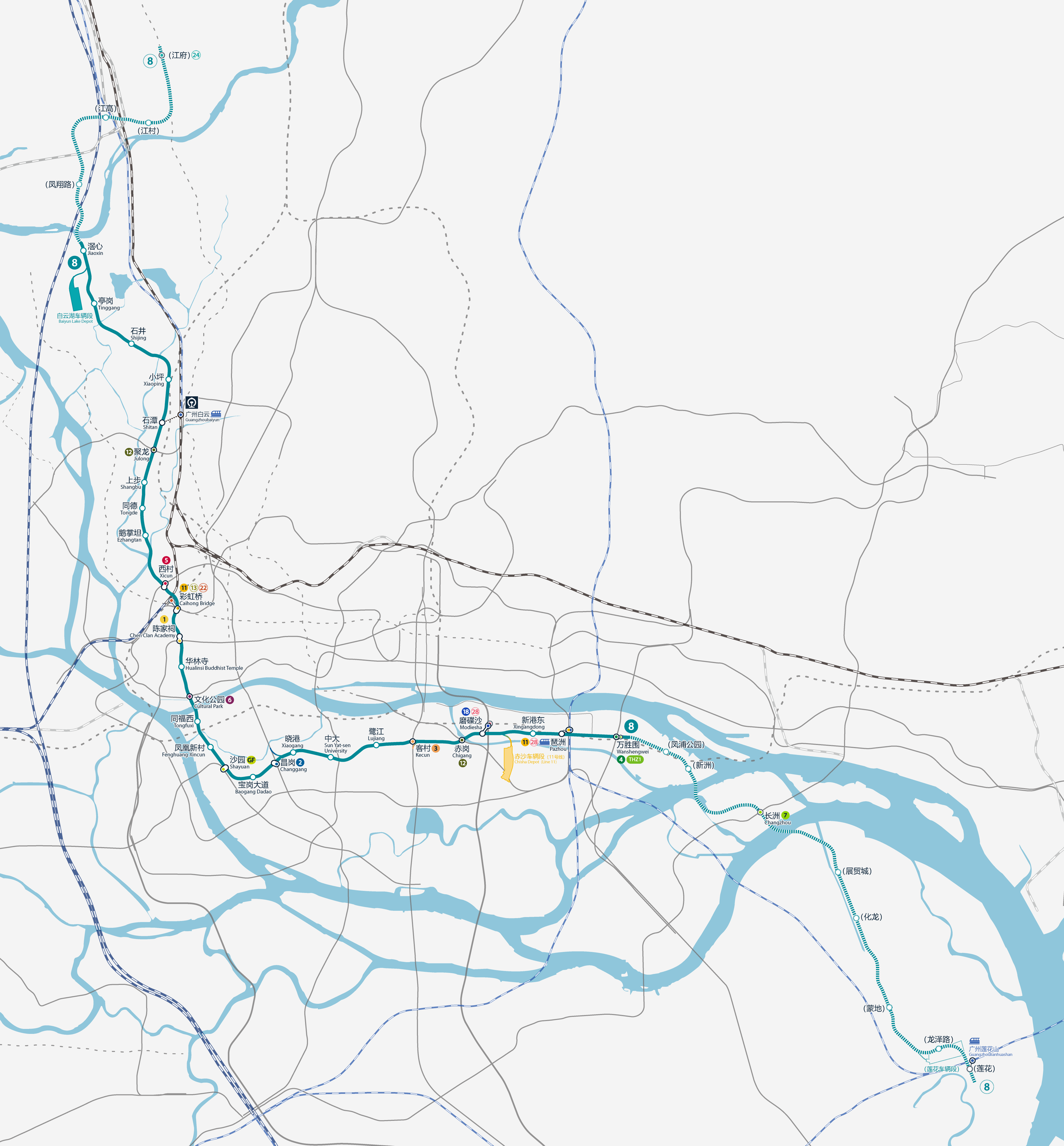 廣州地鐵8號線、8號線延長線（鳳凰新村~文化公園）及8號線北延段（文化公園~白雲湖）路線圖，按真實走向比例繪畫